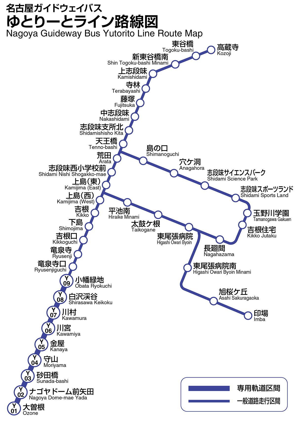 名古屋ガイドウェイバスの路線図 (Map of Nagoya Guideway Bus)